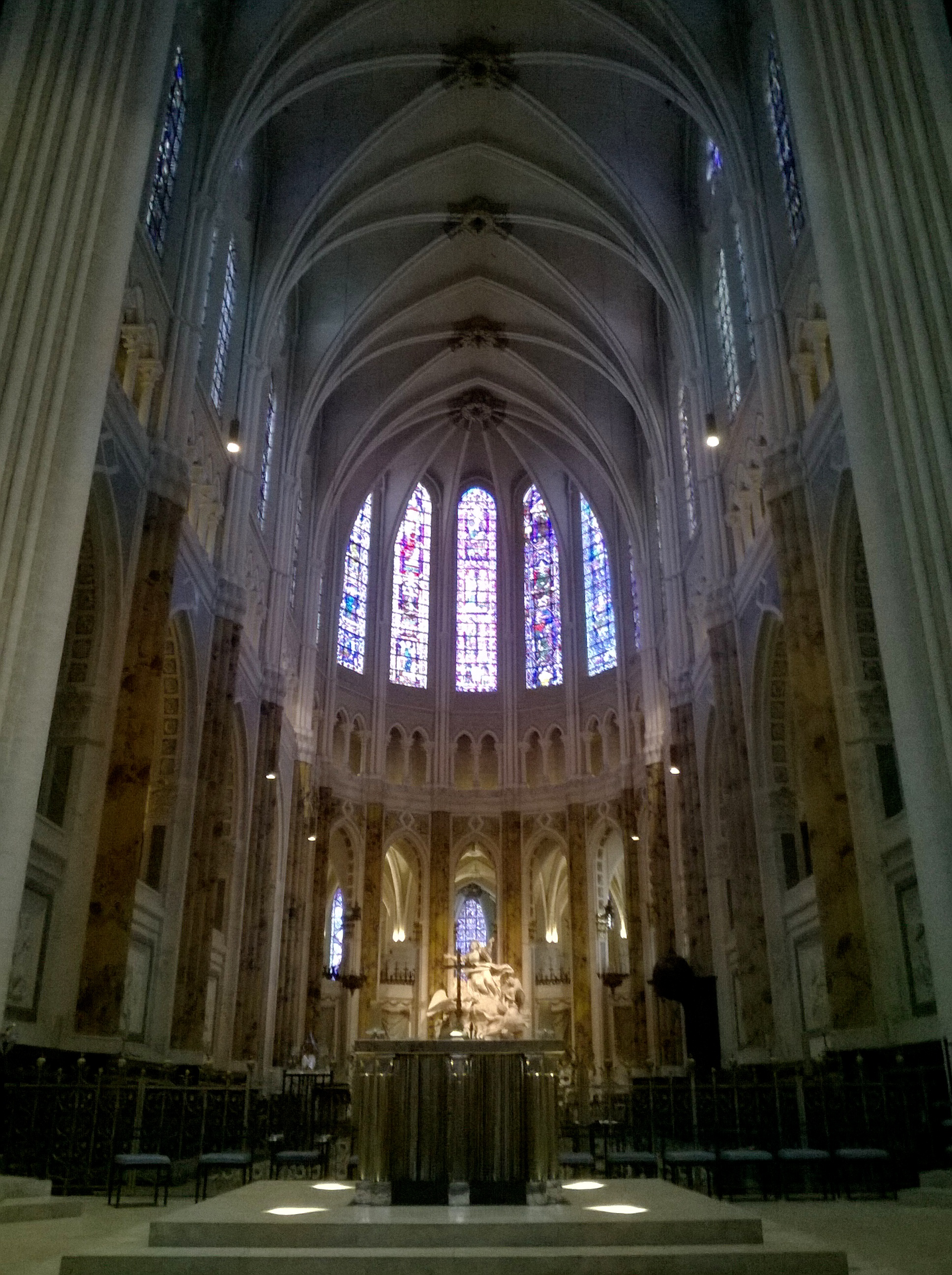 Eure-Et-Loir Chartres Cathedrale Choeur 03032016